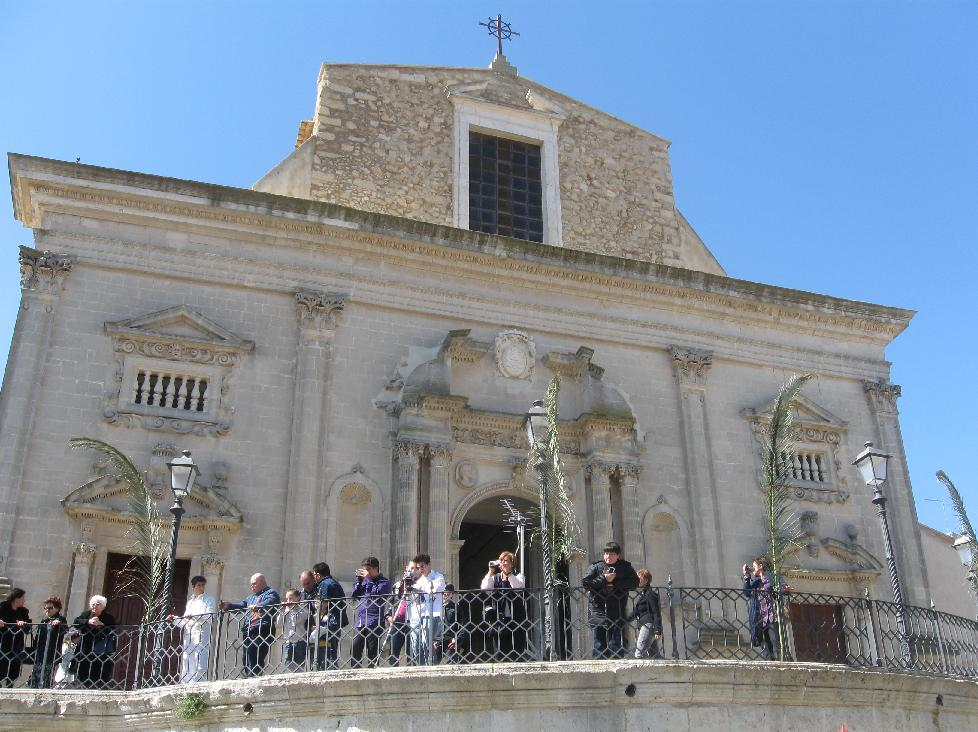 La chiesa madre di Licodia Eubea (Chiesa di Santa Margherita) per il venerdì santo 2010.